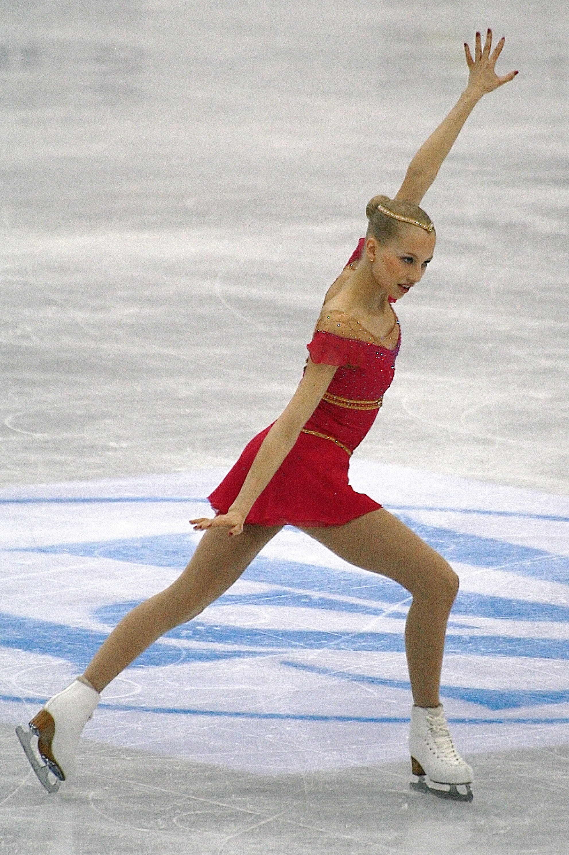 Юулия Турккила (Финляндия) на чемпионате мира по фигурному катанию 2012